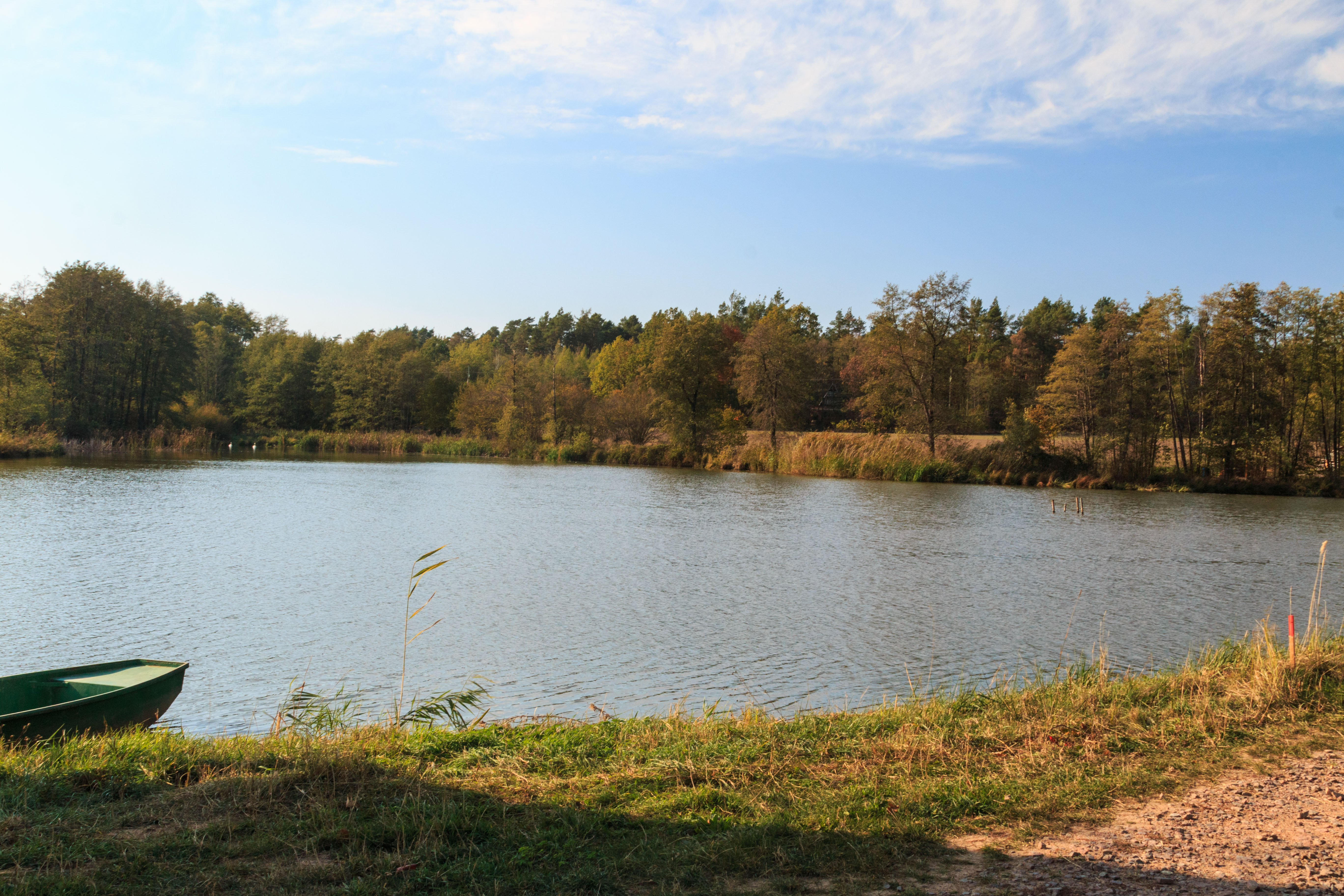 Nový rybník (Loučky) Project: Vodstvo. Ticket: 1617.